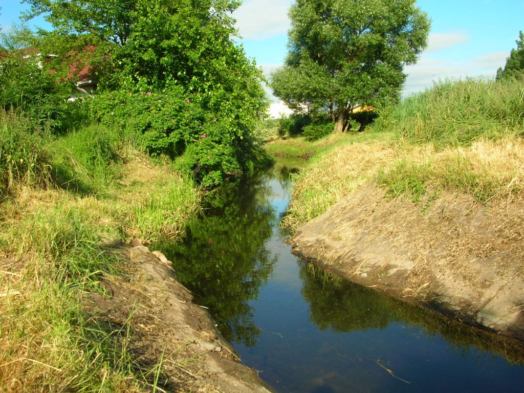 Struga Młyńska - wlot do Kanału Bydgoskiego